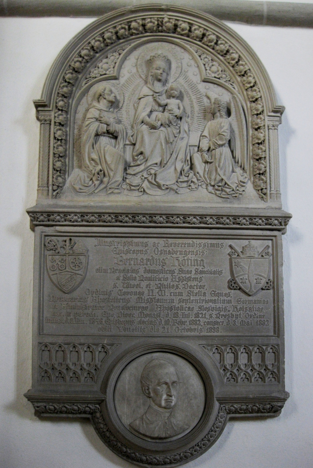 Epitaph des Osnabrücker Bischofs Bernhard Höting im Dom St. Peter in Osnabrück